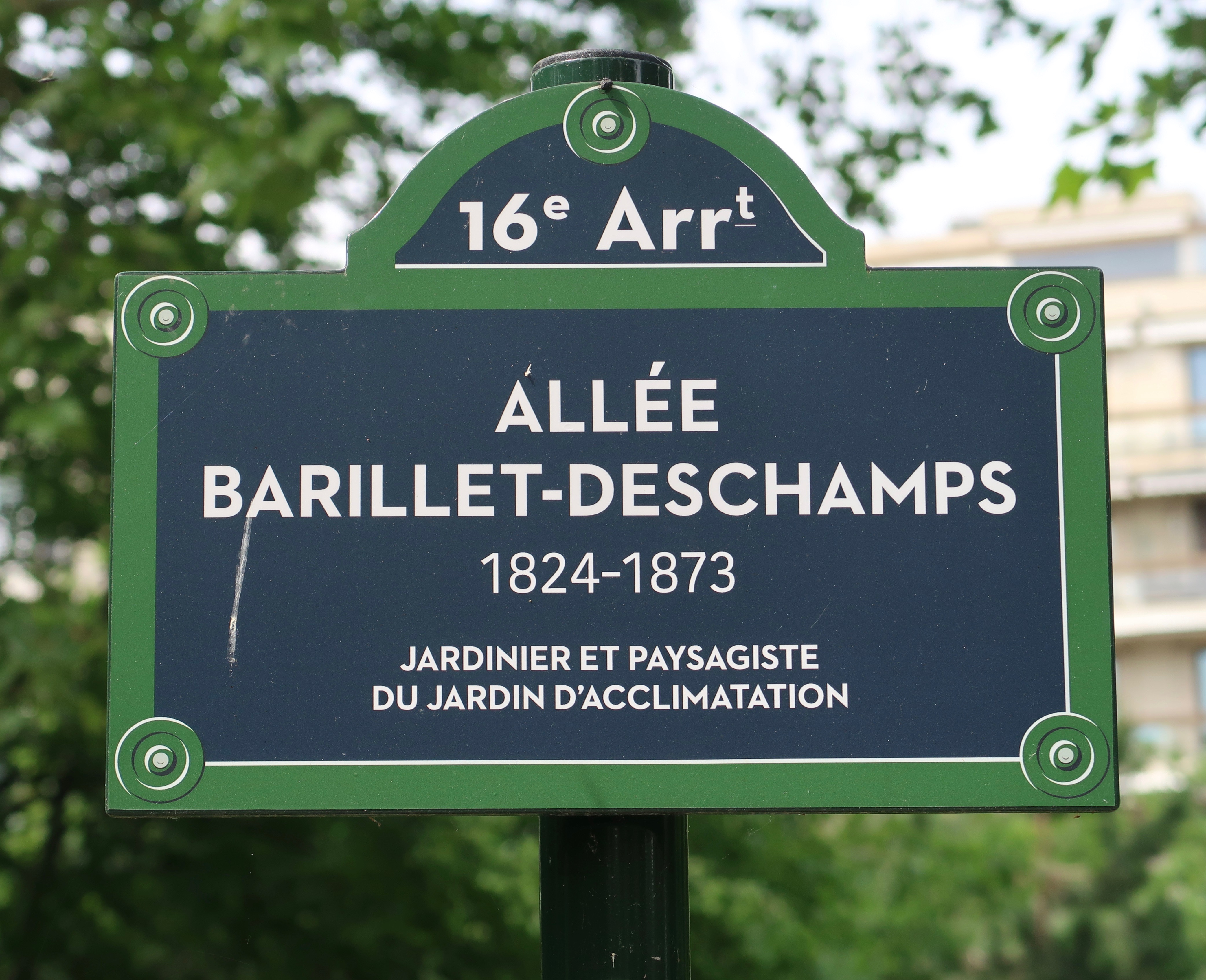 Plaque de l'allée Barillet-Deschamps, dans le jardin d'acclimatation (Paris, 16e).